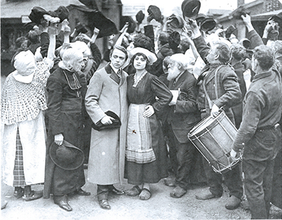 Film The Belgian (1918)